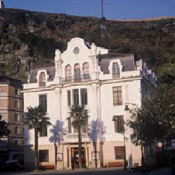 Ayuntamiento de Valdés, en Asturias